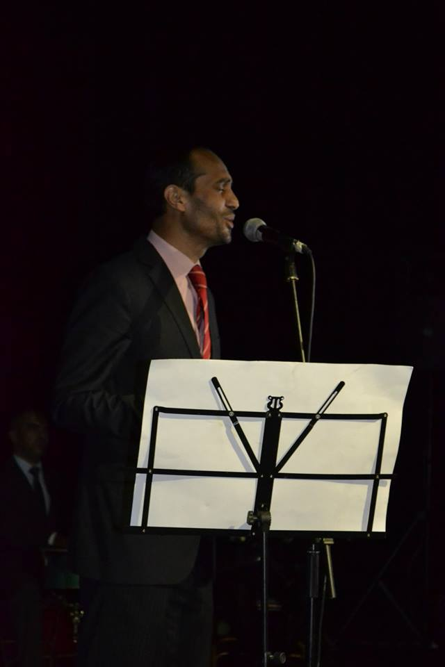 سهرة مع الجمال المحمدي للفنان نبيل نور